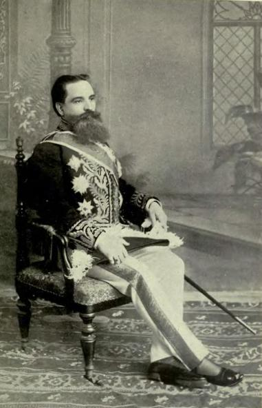 Cedomilje Mijatović, embajador serbio en Londres a comienzos del siglo XX.